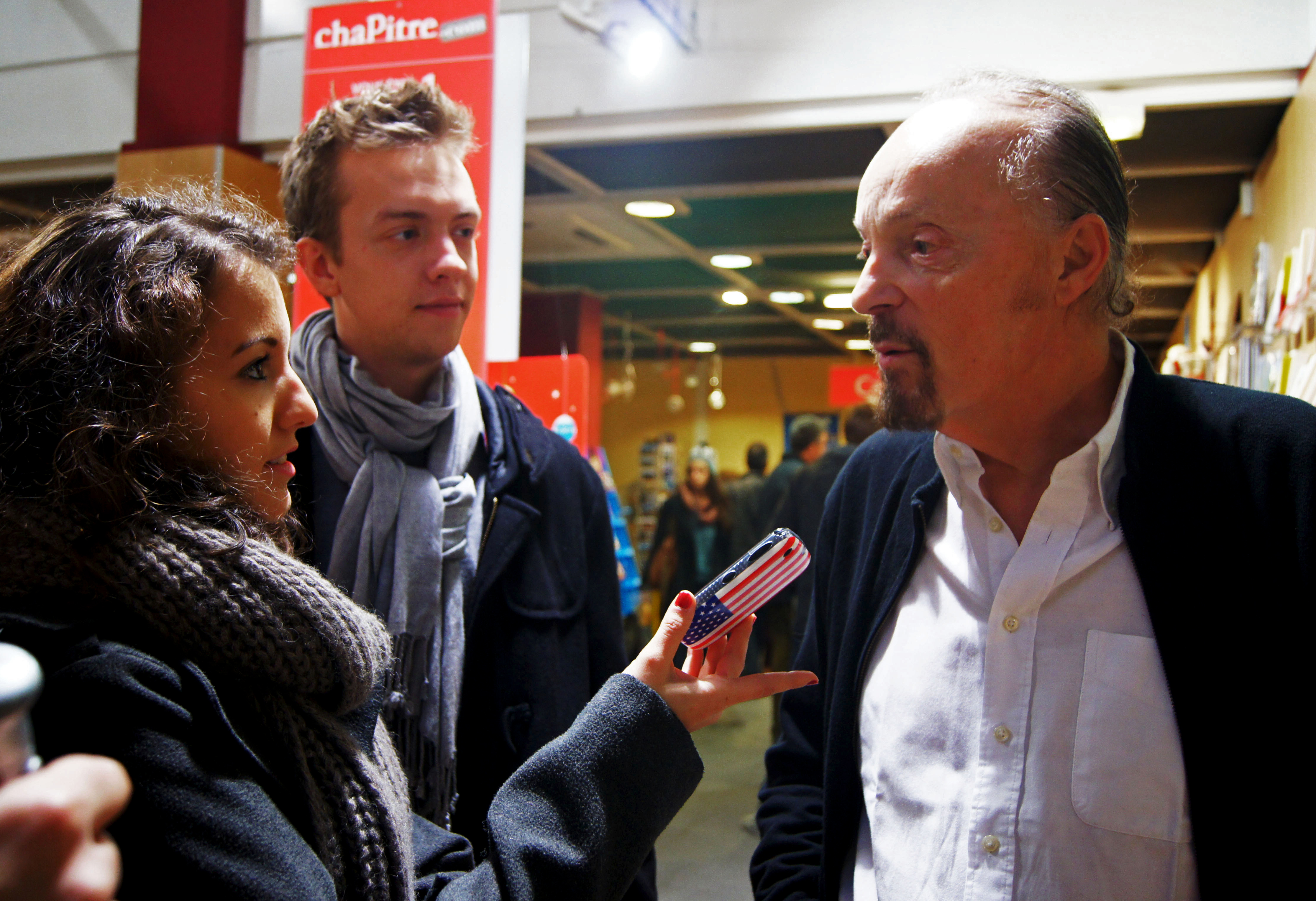 Interview d'Alan Stivell par des étudiants de Sciences Po lors d'une séance de dédicaces à Rennes le 15 décembre 2012.